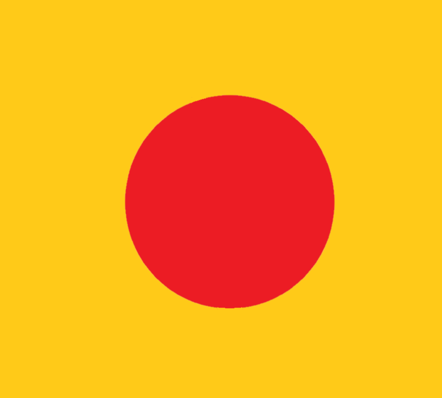 「日本人義勇軍行進図」を参考に投稿者が作成。